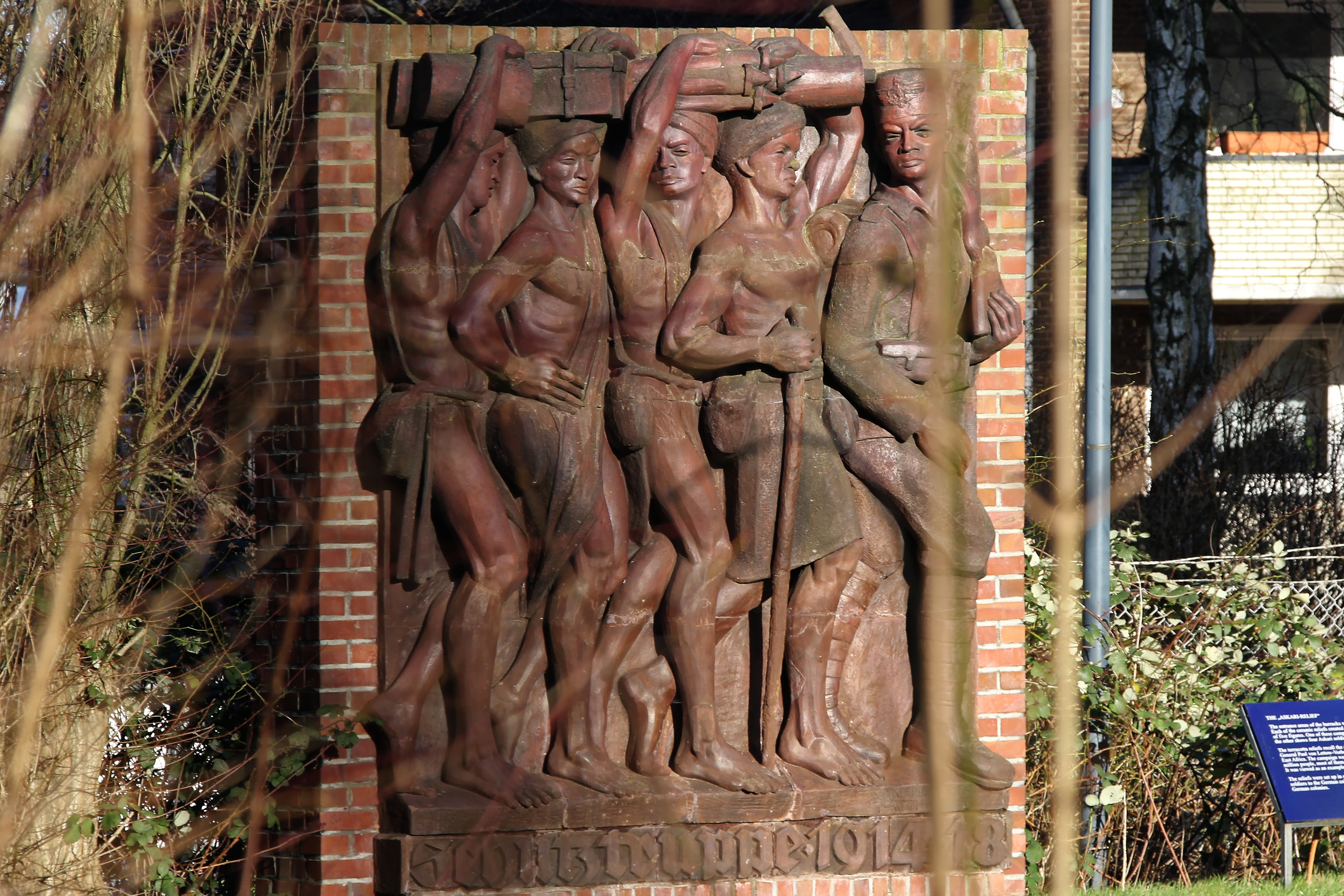 ehemalige Lettow-Vorbeck-Kaserne Hamburg, Tansania-Park, Askarirelief